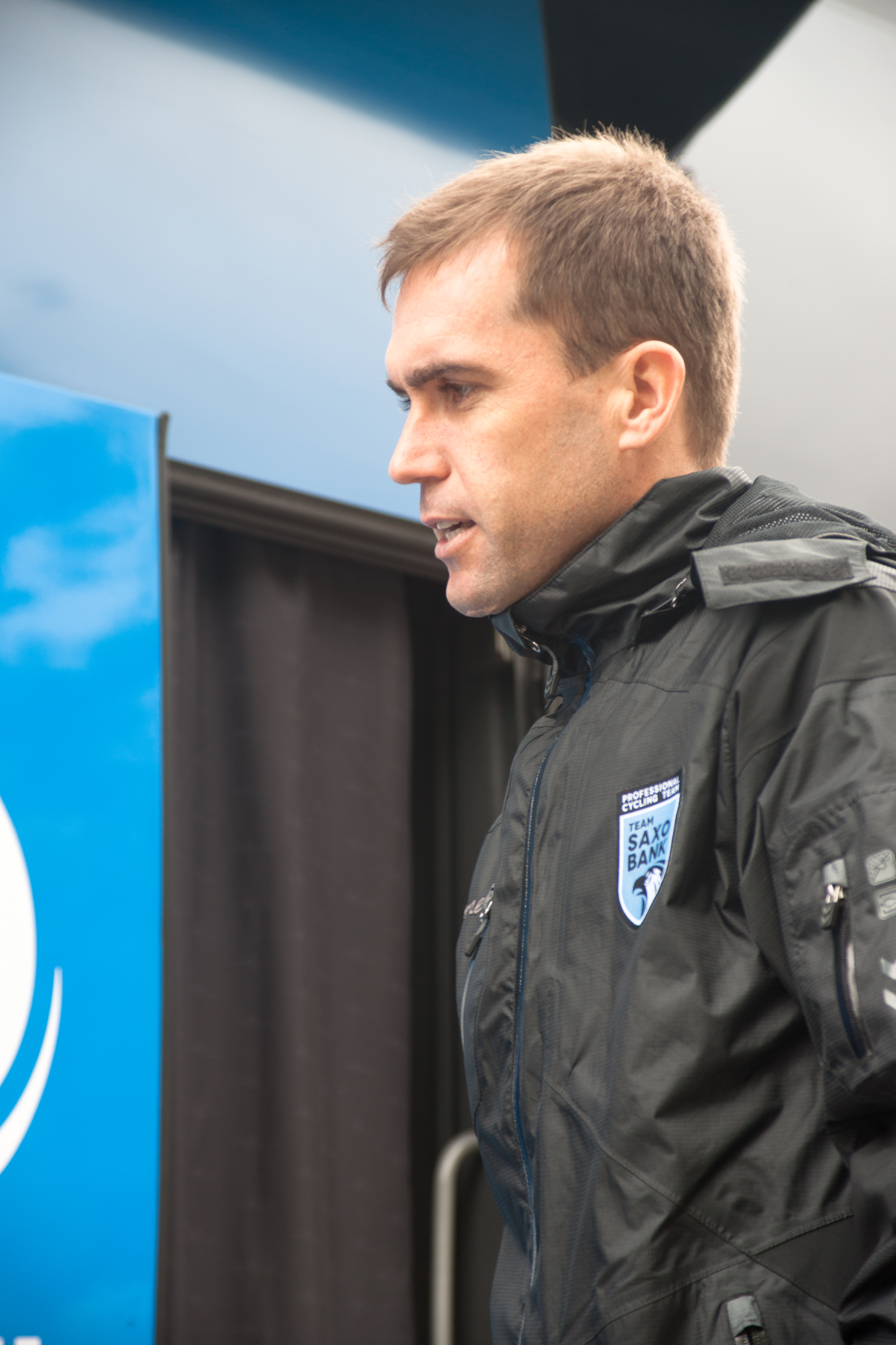 Bradley Mc Gee lors du prologue du Tour de Romandie 2012